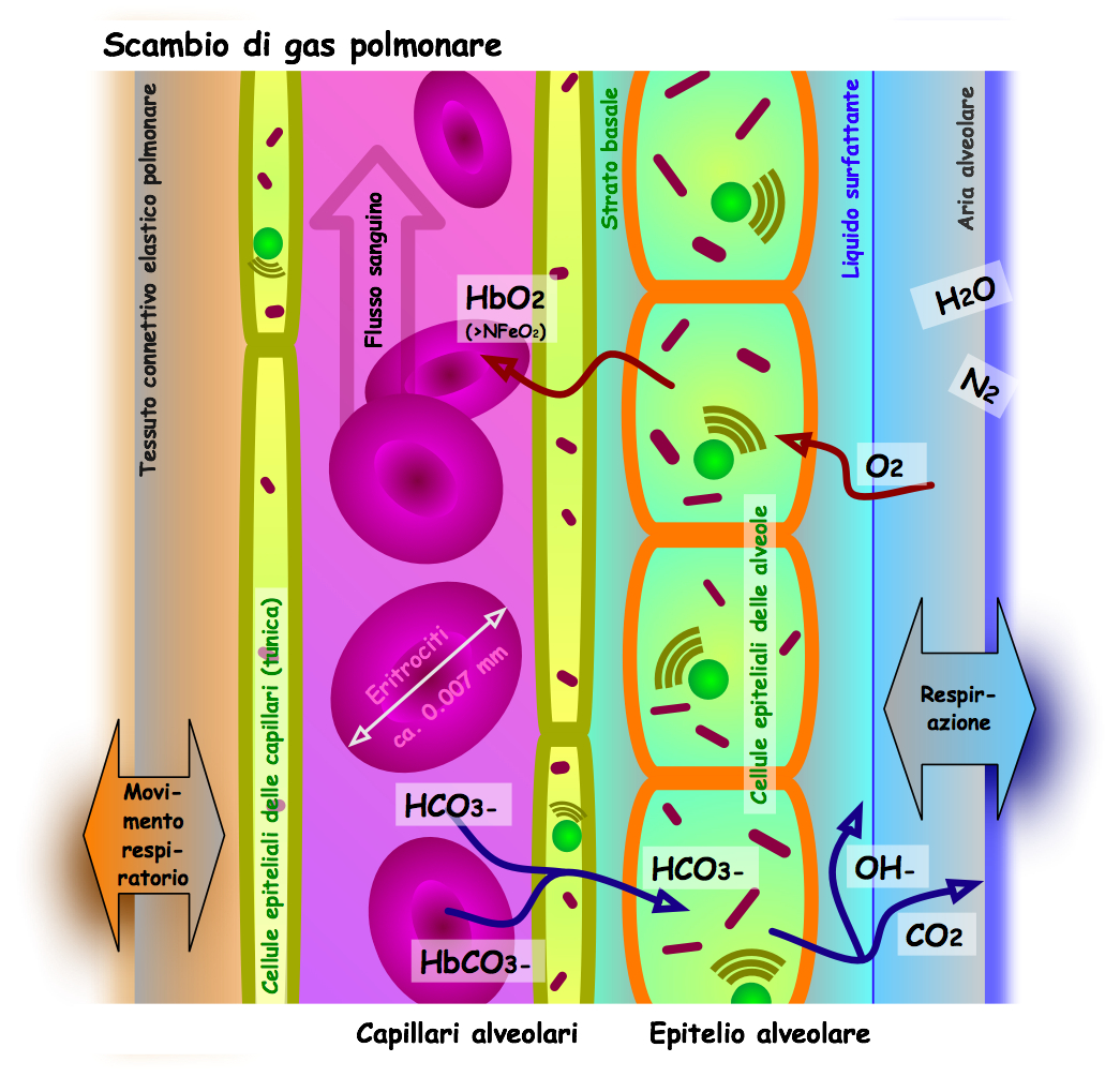 Grafica: Medicina: Respirazione: Scambio di gas polmonare: Grafica: Medicina: Apparato respiratorio: Anatomia, fisiologia: Scambio di gas polmonare: alveolo, alveolare, epiteli, capillare, cellule, respirazione, flusso sanguingno, eritrociti, ossigeno, anidride carbonico